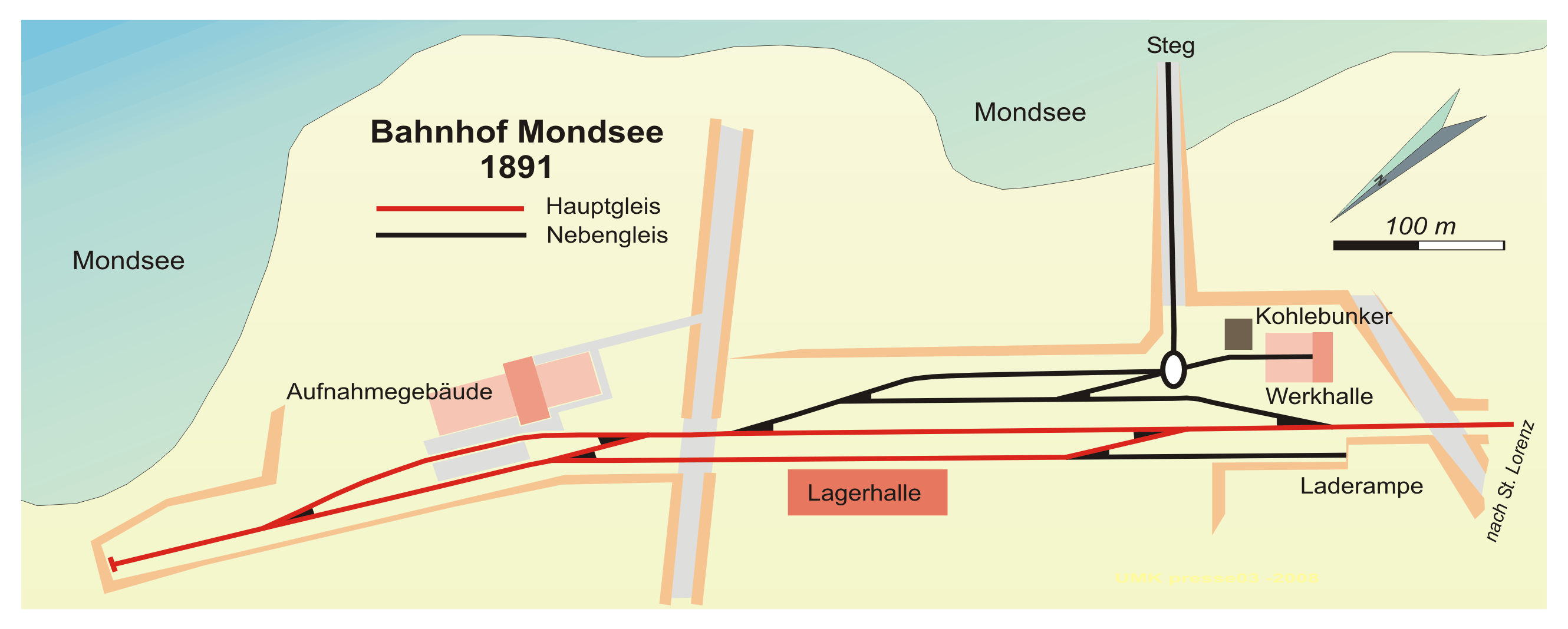 Gleisbahn des Bahnhofs Mondsee (Salzkammergut) 1891